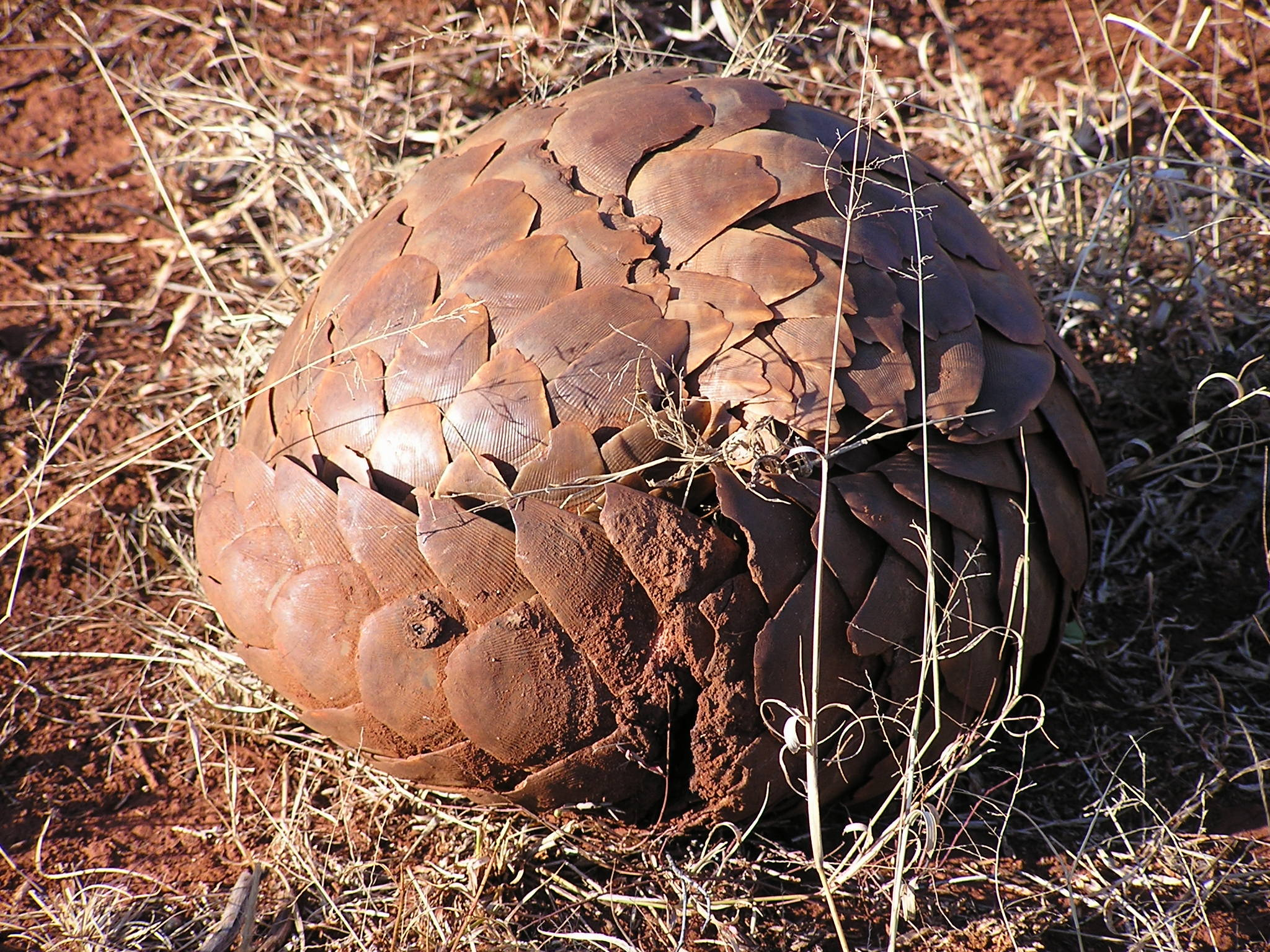 Eingerolltes Steppenschuppentier (Manis temminckii), Madikwe Game Reserve, Südafrika